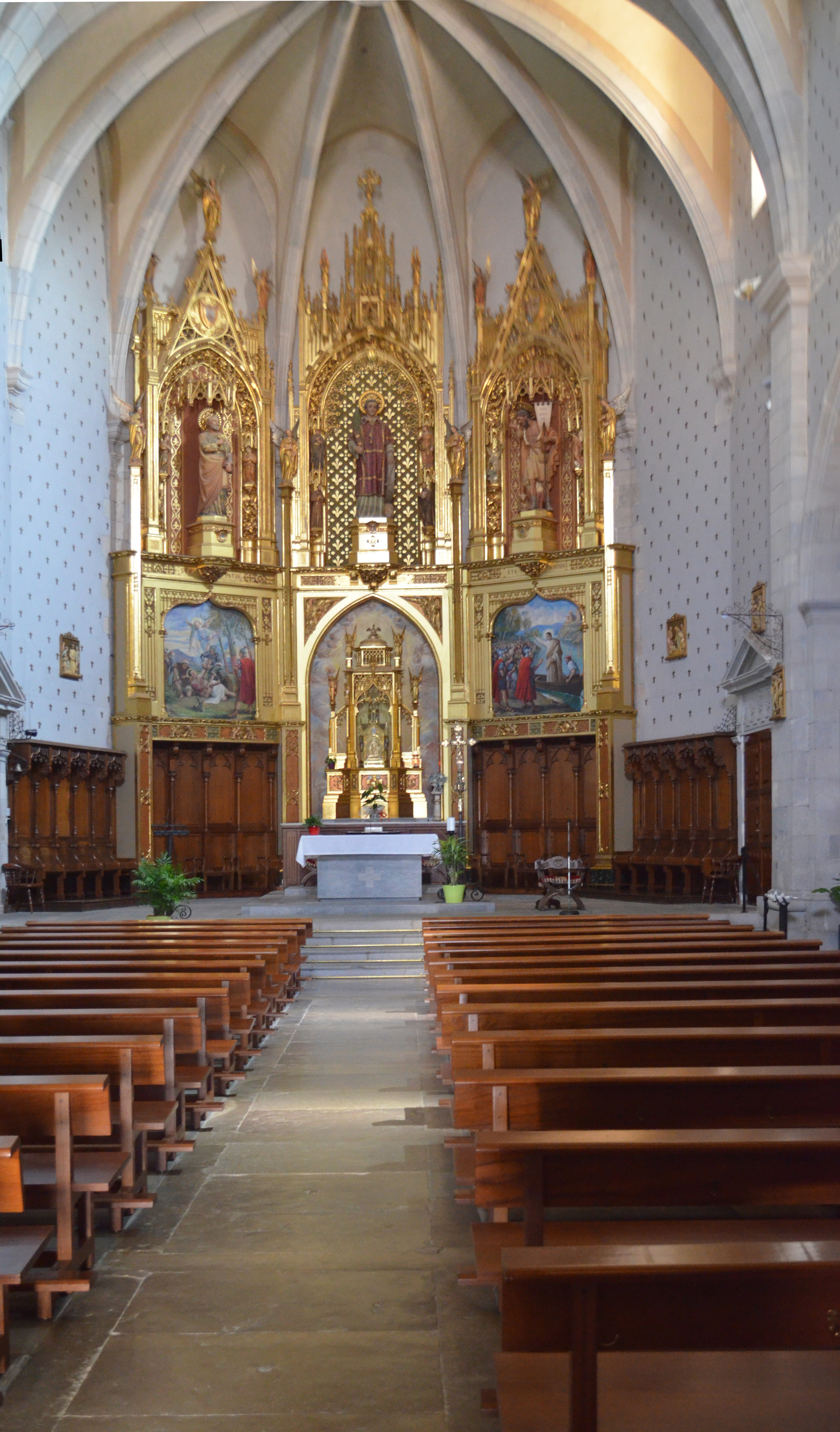 Llagostera, Kirche, Innen